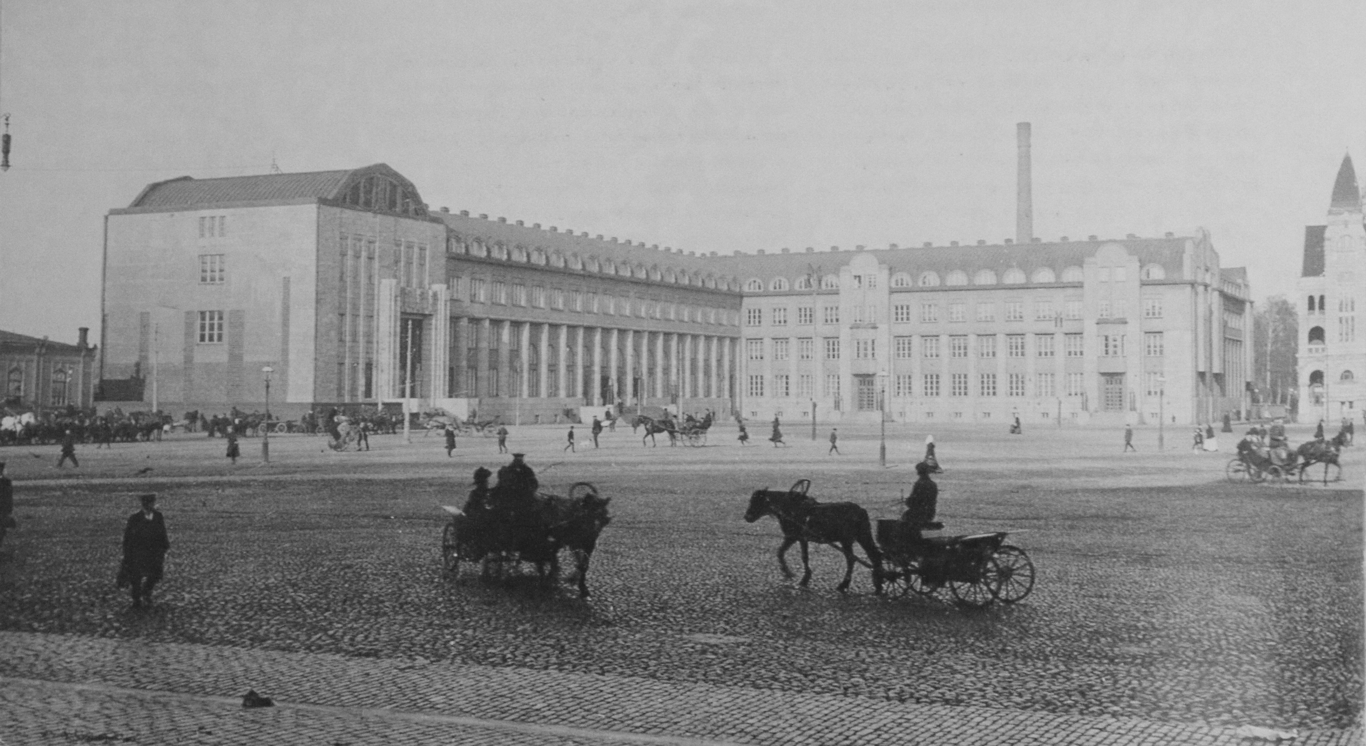 Helsingin rautatieaseman hallintorakennus vuonna 1911.